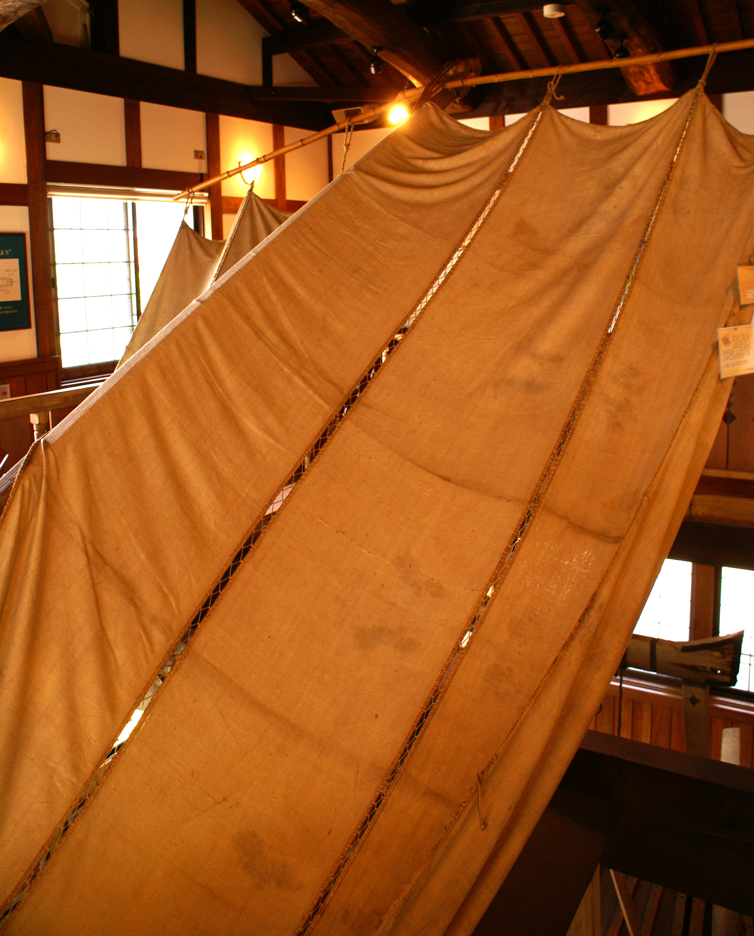 Japanese traditional sail of Edo period at Marukobune no yakata (Kitaasai-cho, Shiga)